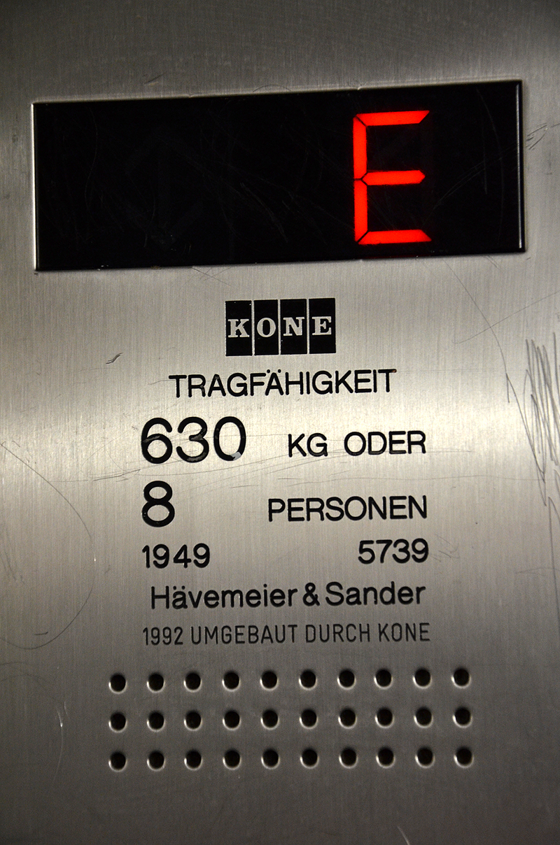 Detail des 1949 von der Firma Hävemeier & Sander eingebauten Fahrstuhls im Europa-Haus in Hannover, 1992 umgebaut durch das Aufzugs-Unternehmen Kone ...